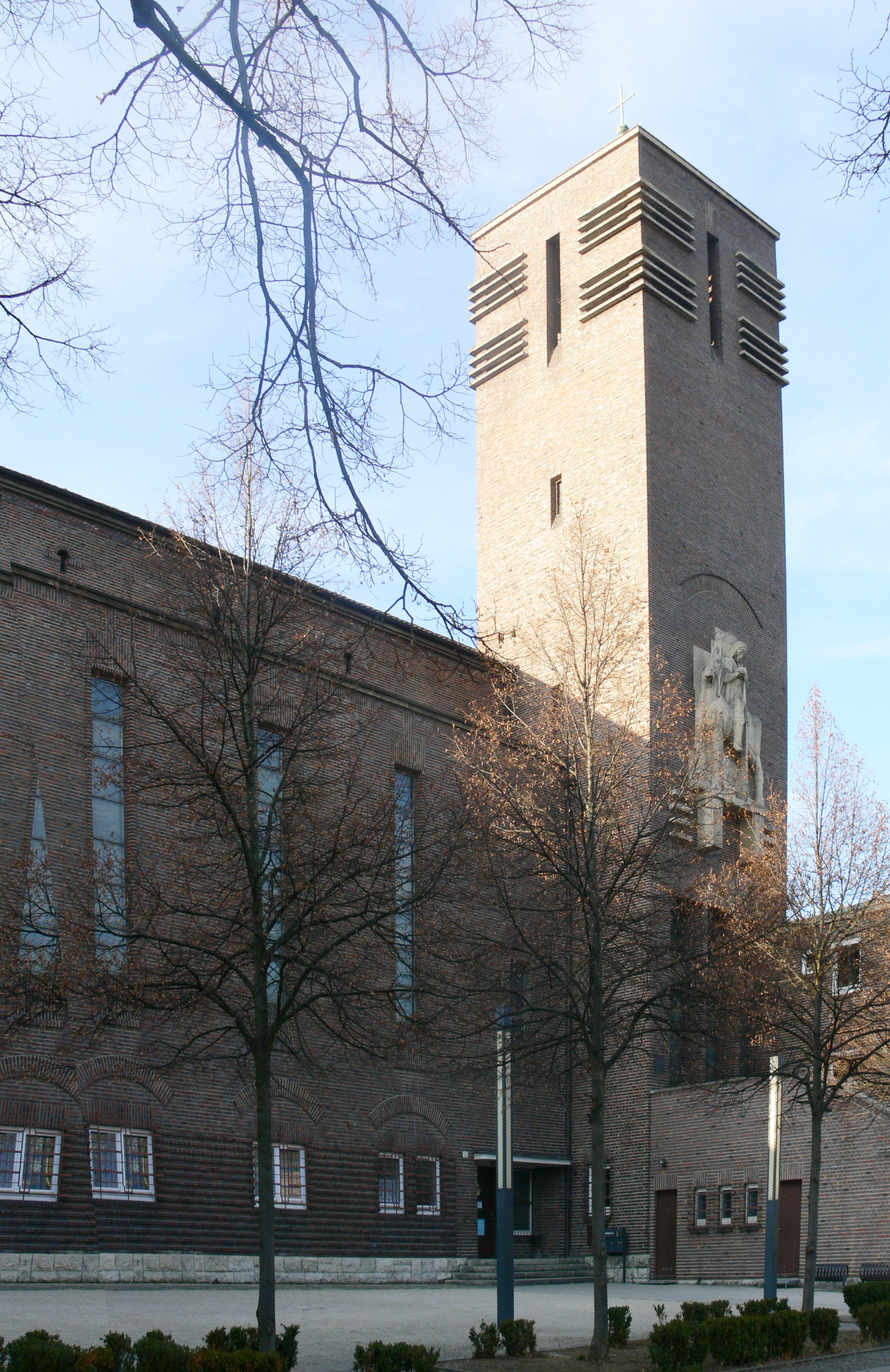 Kath. Pfarrkirche St. Georg, Stuttgart-Nord (Heilbronner Straße), erbaut 1929–1930 von Hugo Schlösser